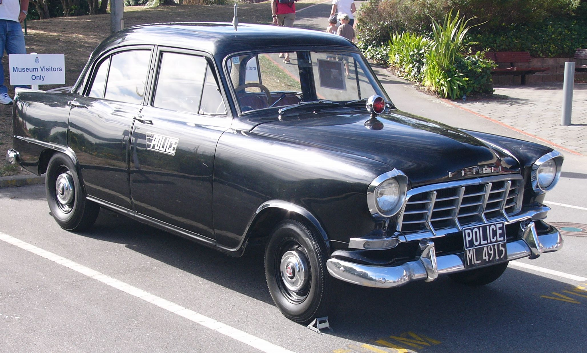 More Photos available at